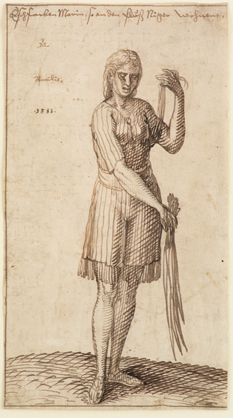 Melchior Lorck (1527-1626), Askefarvet morisk kvinde, som lever ved Niger-floden, 1583